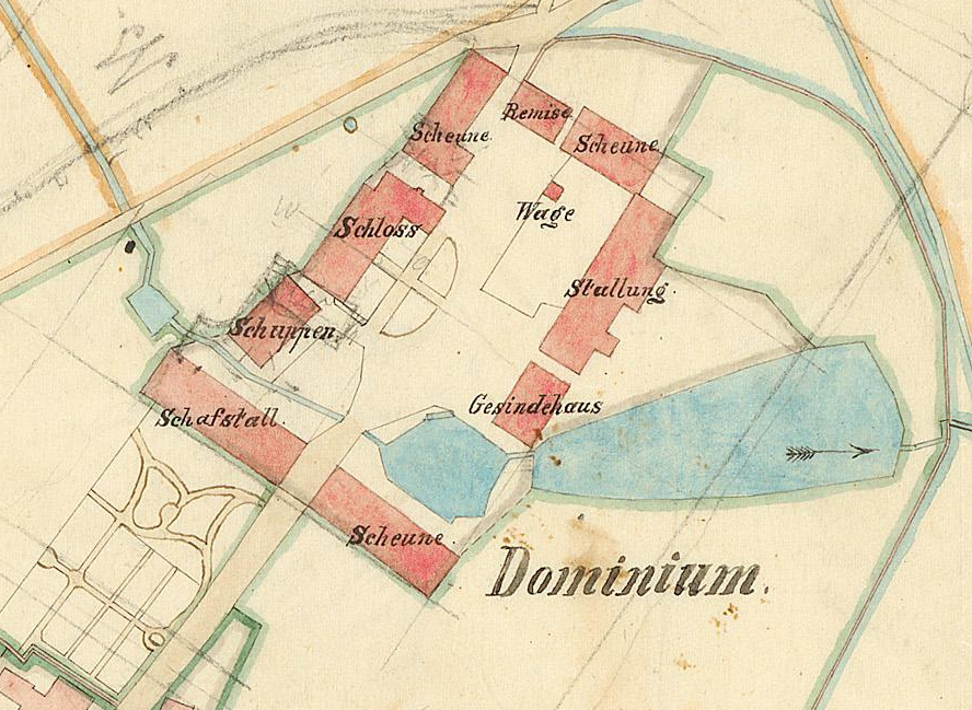 Lageplan Schloss Klonitz, Darstellung vor Ausbau im Jahr 1878. Der Original-Lageplan vom Architekten Lüdecke entstand in oder vor dem Jahr 1878 - bei diesem Bild handelt es sich um einen Ausschnitt der Zeichnung